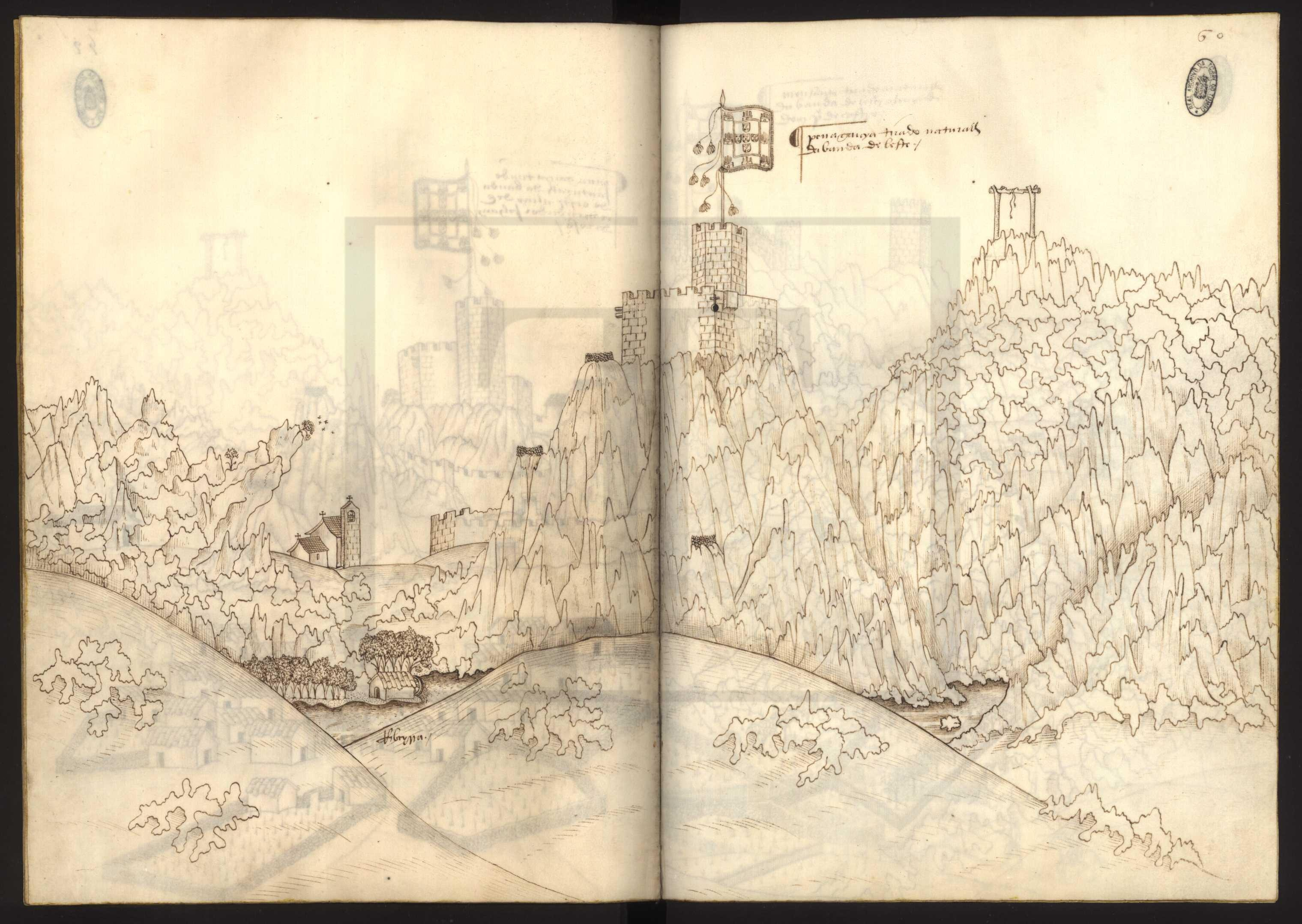 Livro das Fortalezas 60 - Penas Róias